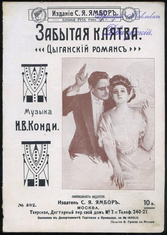 ЗАБЫТАЯ КЛЯТВА. Цыганский романс. (№ 382). (Музыка И.В. Конди). М. Издание С.Я. Ямбора. 1910-е гг. 18,8 х 13,3.